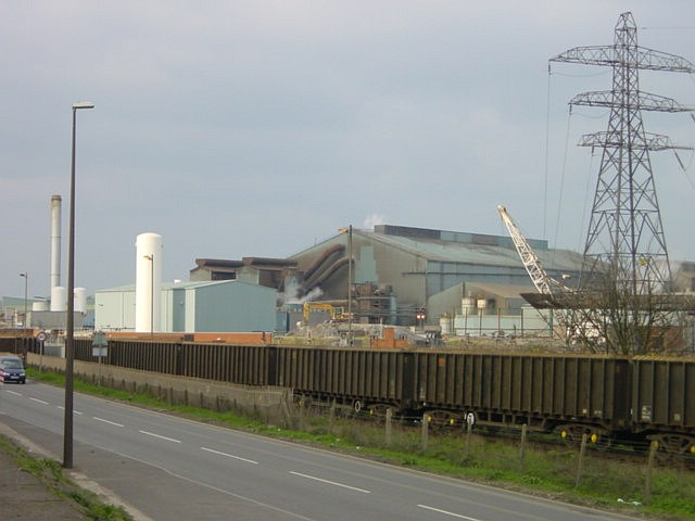 Sheerness Steel Mill